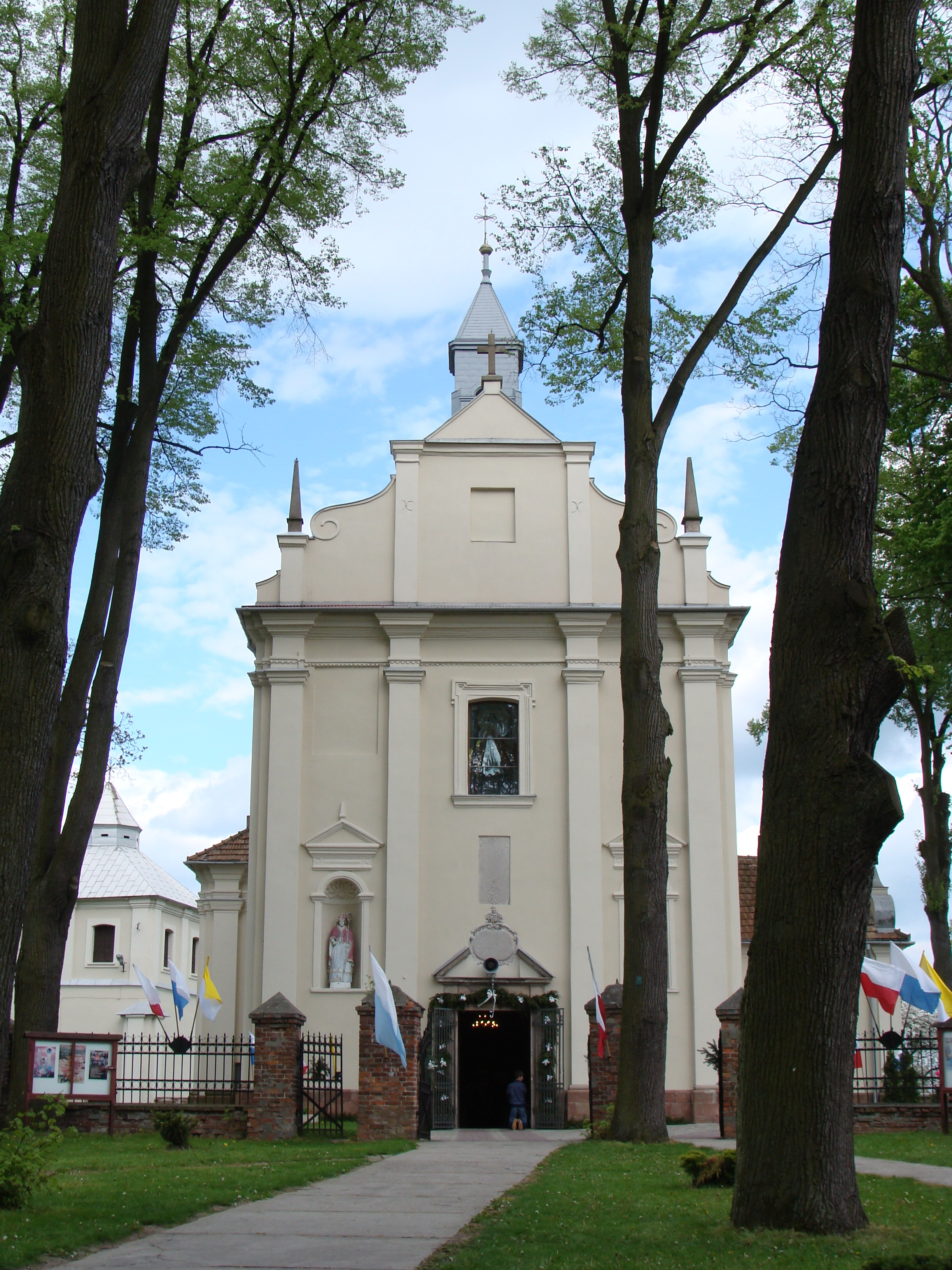 Kościół pw. św. Floriana w Czarncy koło Włoszczowy